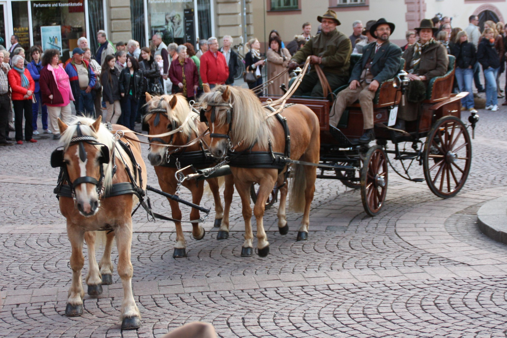 Kutsche Nr. 5 des Korso zur Eröffnung des Internationalen Pfingstturnier Wiesbaden 2013 in Hessen, Deutschland. Eine von Haflingern gezogene Kutschen mit Einhornanspannung